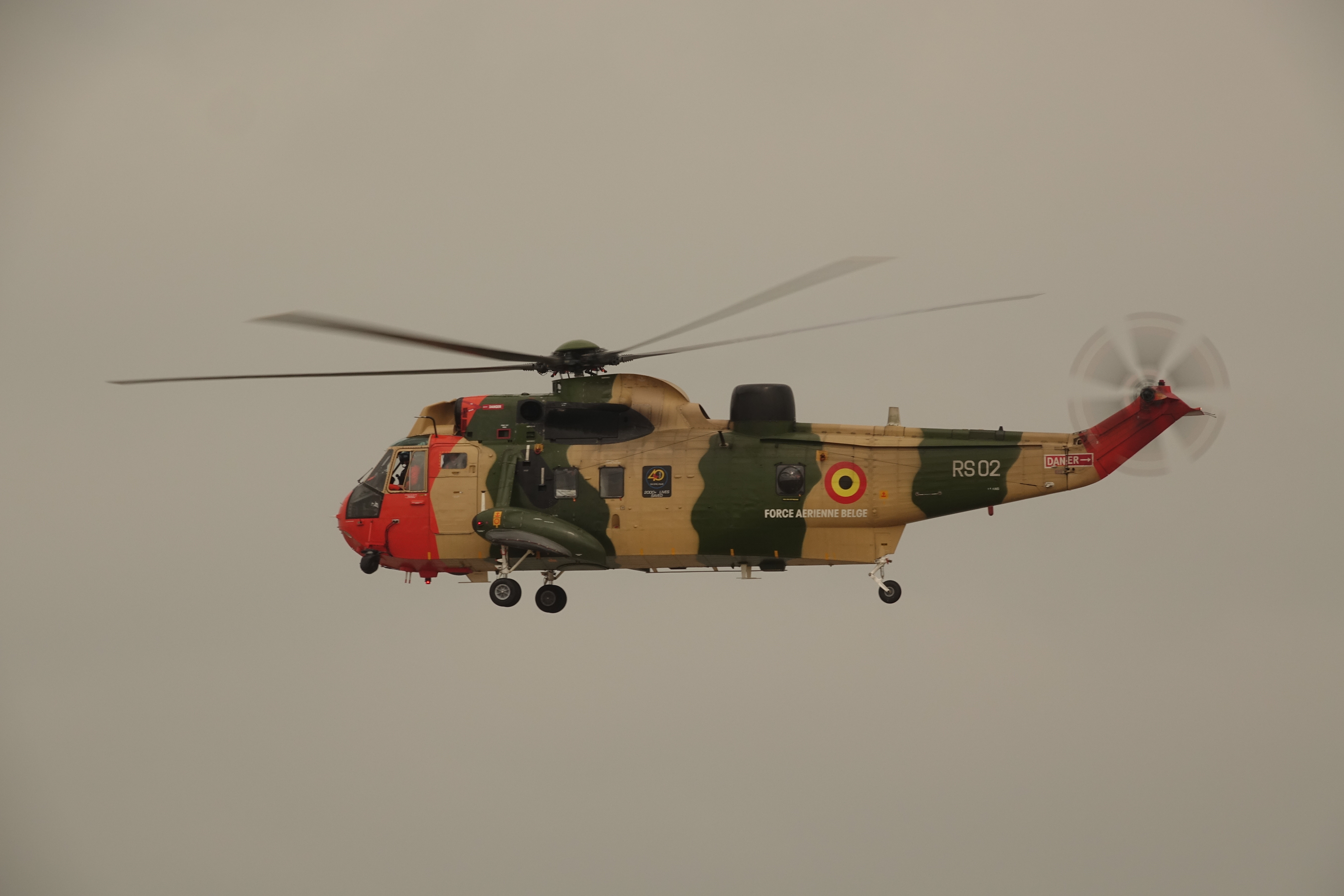 Seaking n°RS 02 de la Défense Belge